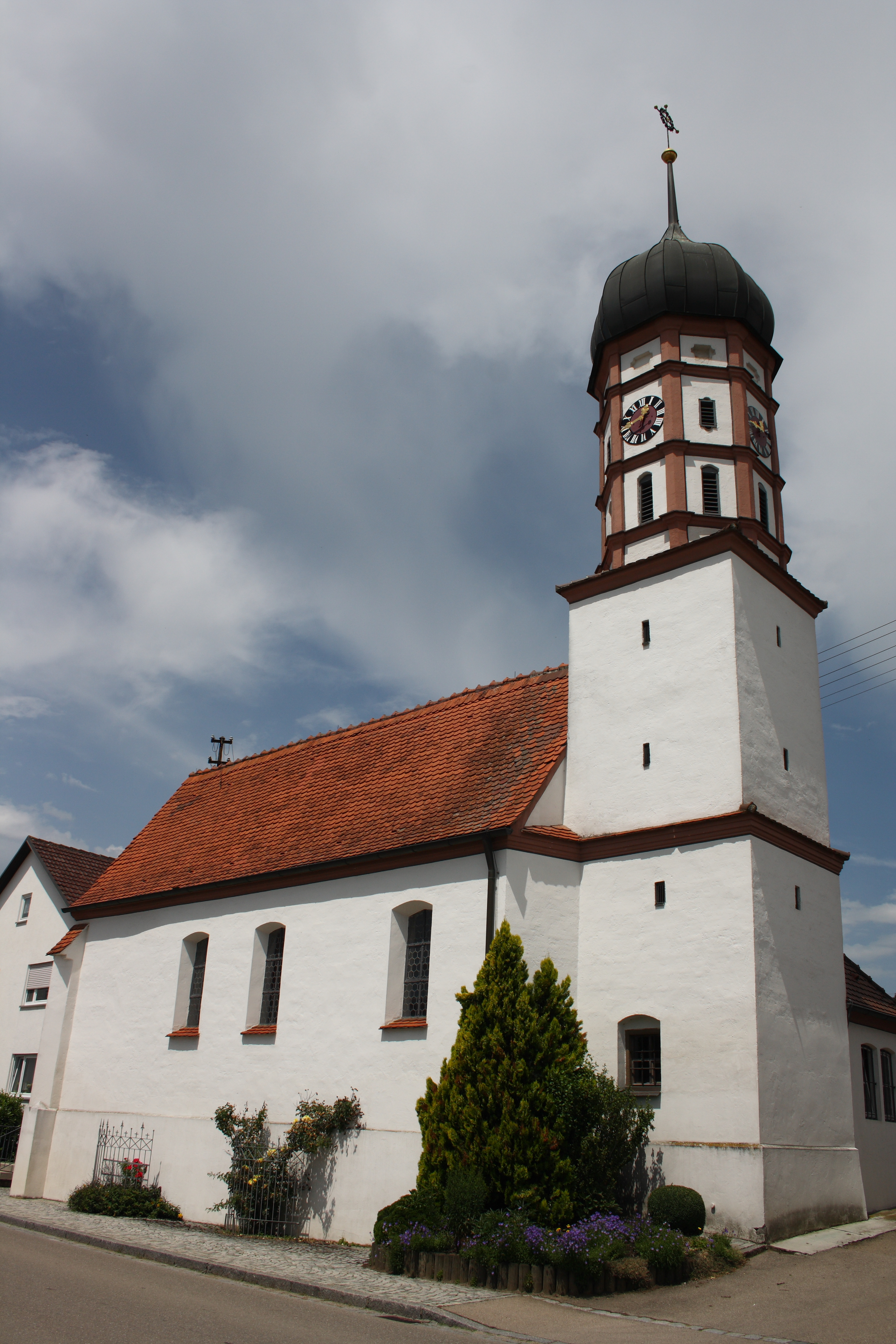 Katholische Filialkirche St. Leonhard in Roßhaupten, einem Ortsteil von Röfingen im Landkreis Günzburg (Bayern), im Kern gotisch, 1680 erweitert